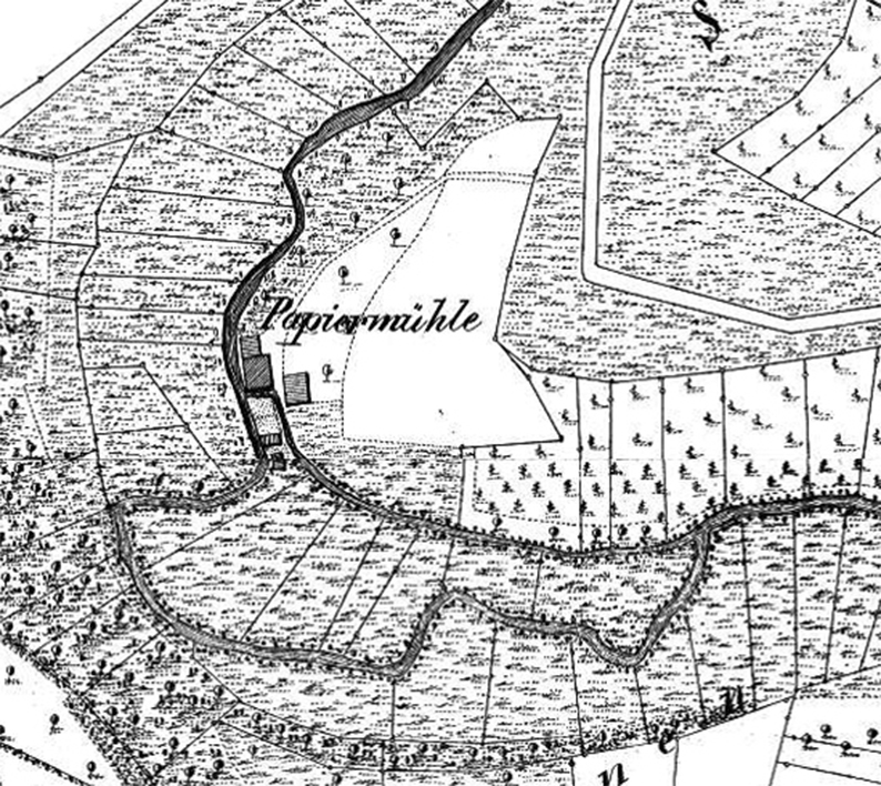 Papiermühle Markgröningen 1831 auf der württembergischen Urflurkarte